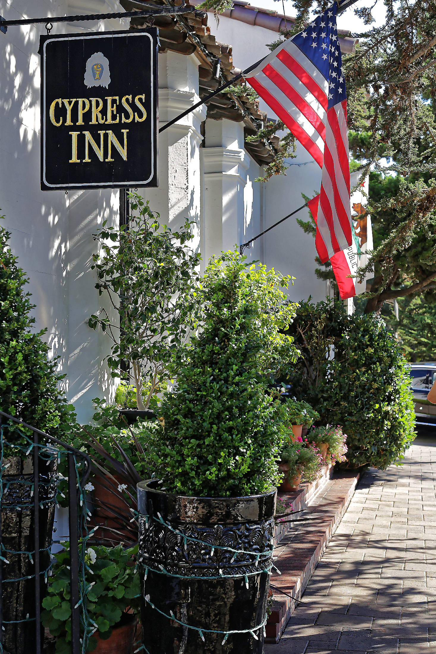 Bilder von der Stadt Carmel-by-the-Sea, von Häusern, vom Stadtpark und von der Stadtbibliothek